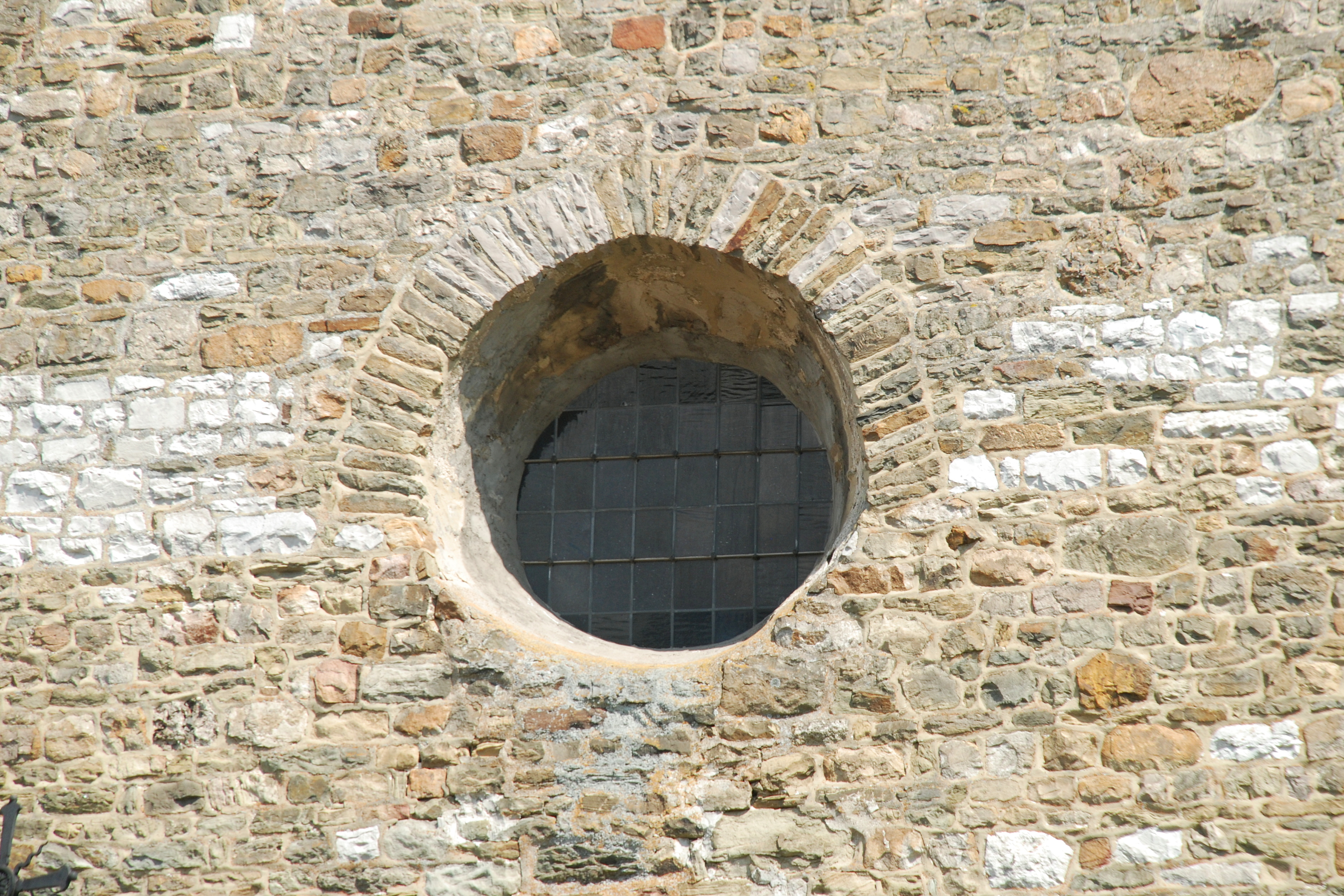 Belgique - Wallonie - Église Saints-Hermès-et-Alexandre de Theux